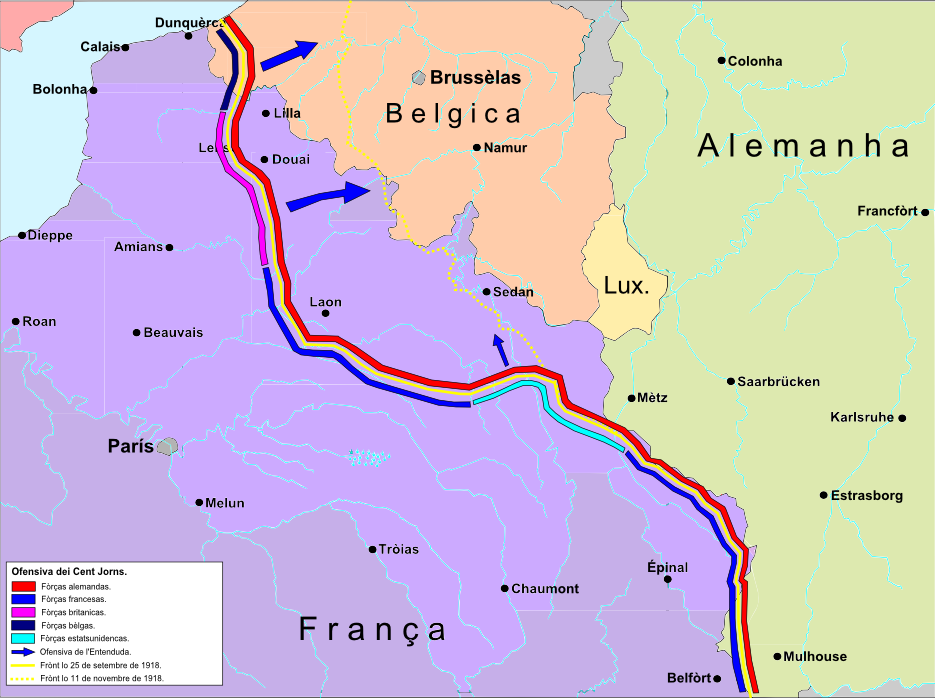 Esquèma generau de l'Ofensiva dei Cent Jorns.